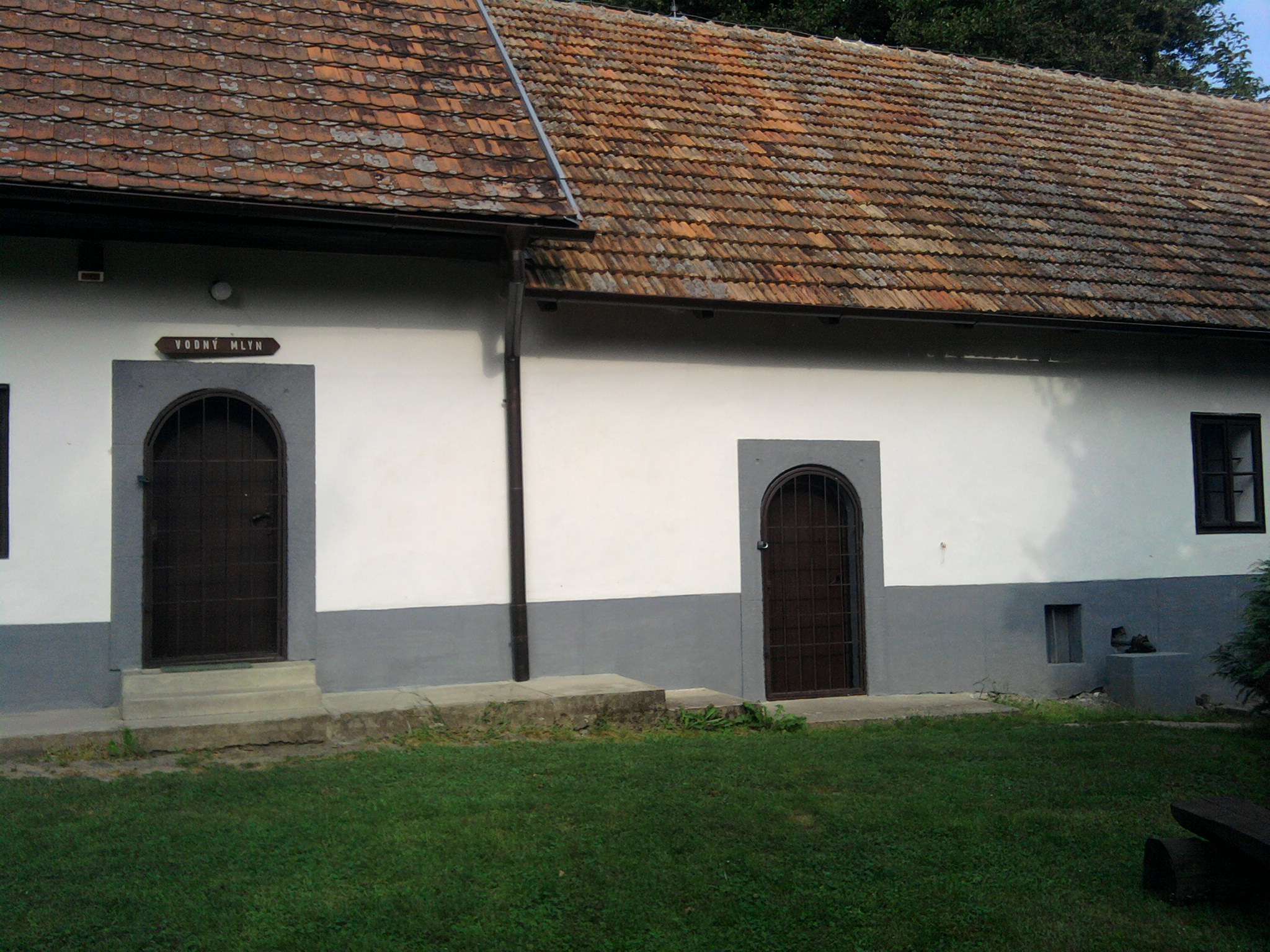 Bohunice, Wassermühle